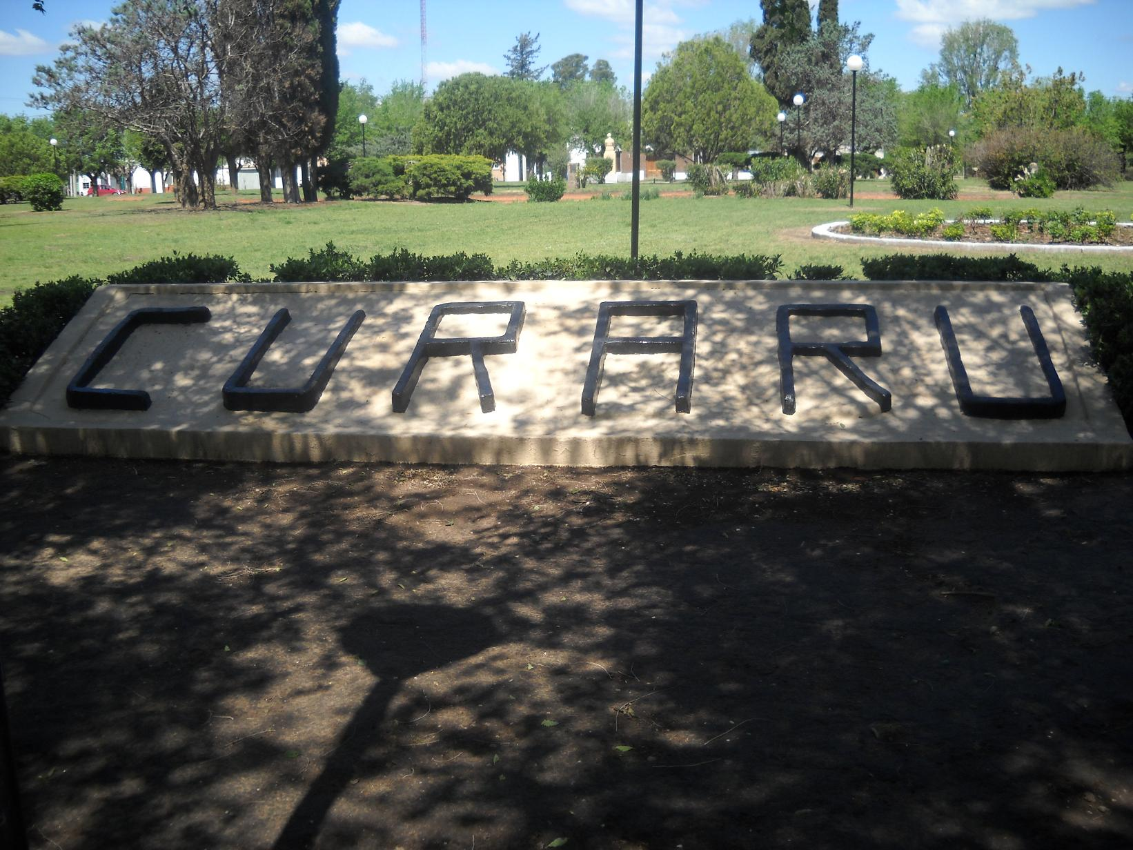 Plaza de Curarú, localidad del Partido de Carlos Tejedor, provincia de Buenos Aires, Argentina.